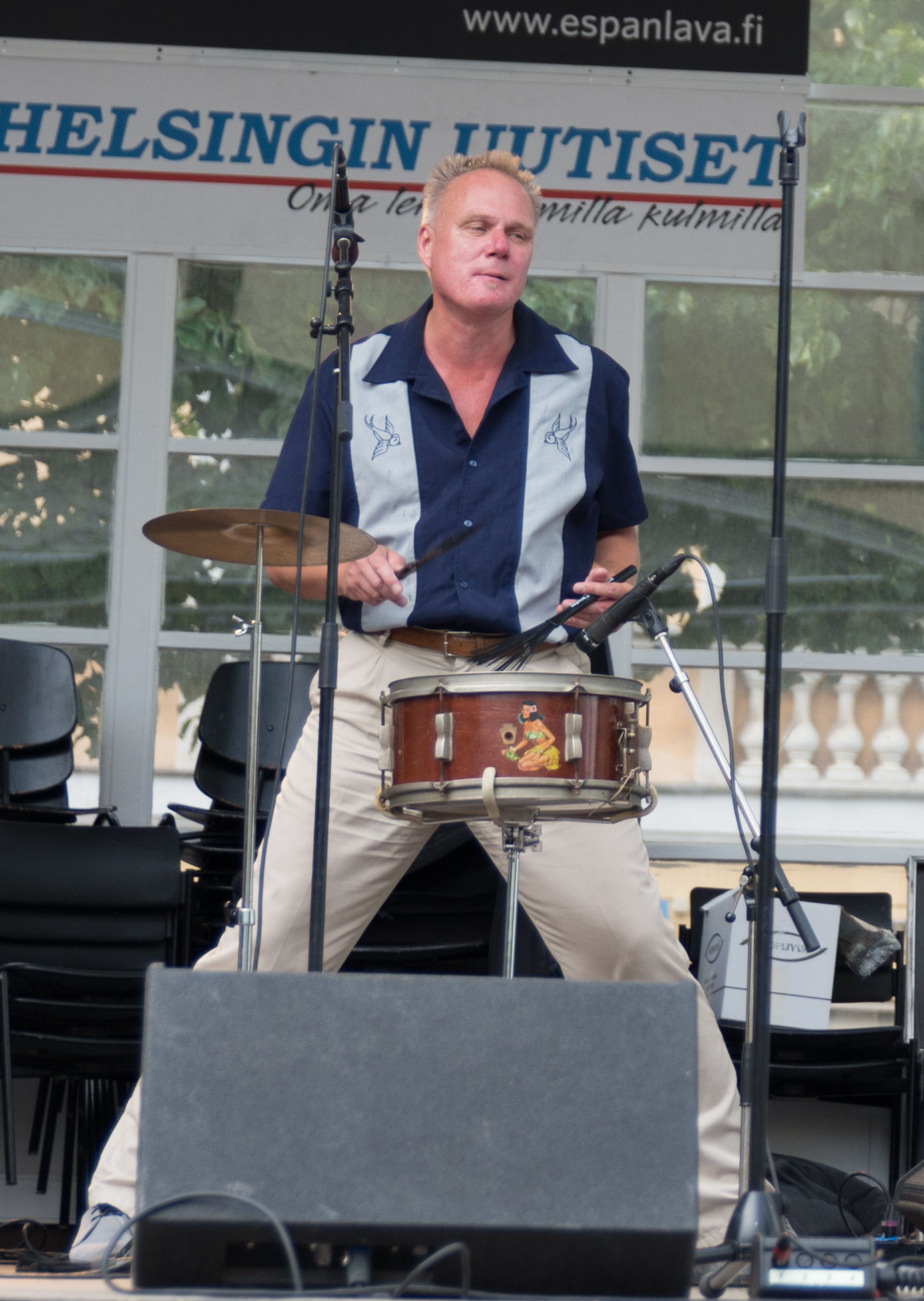 Honey B. Aaltonen suomalainen rumpali